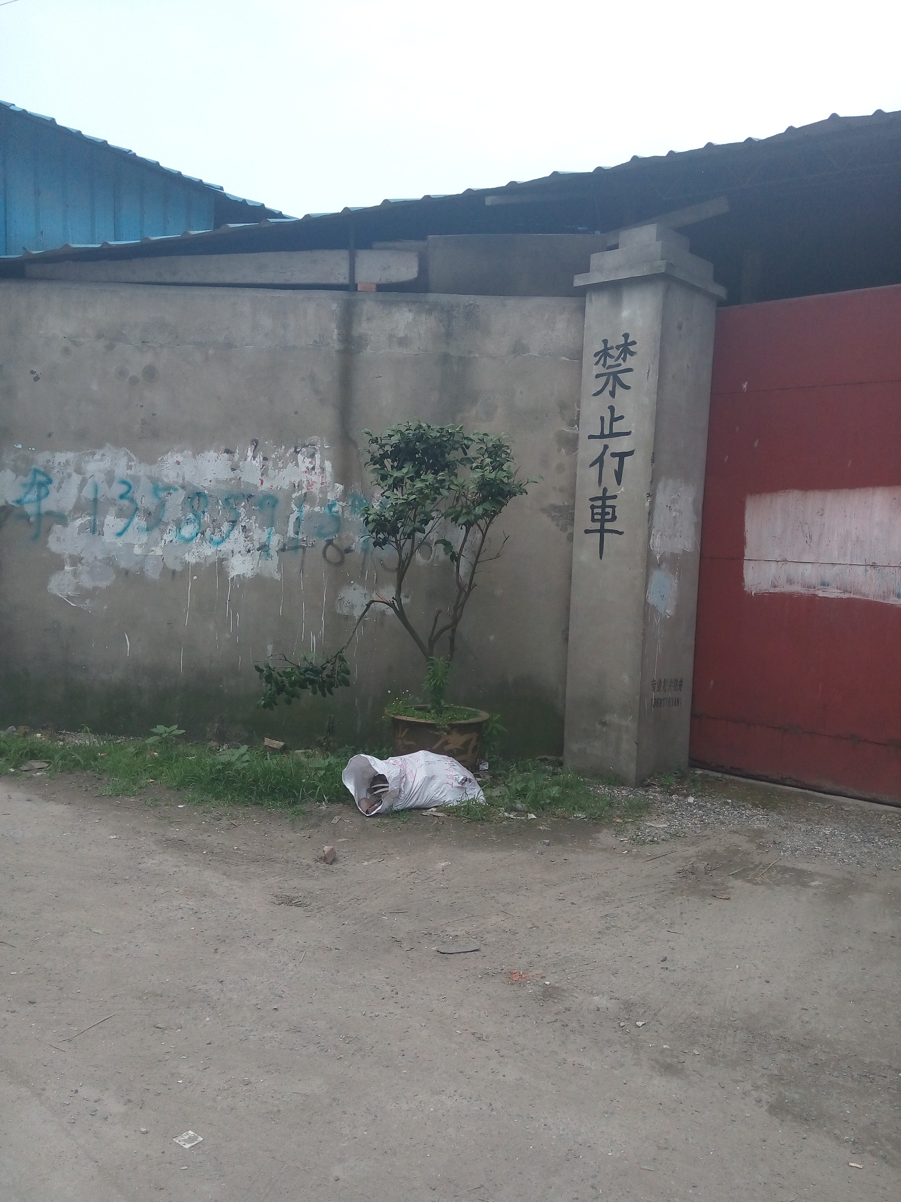 二简字和繁体字混用